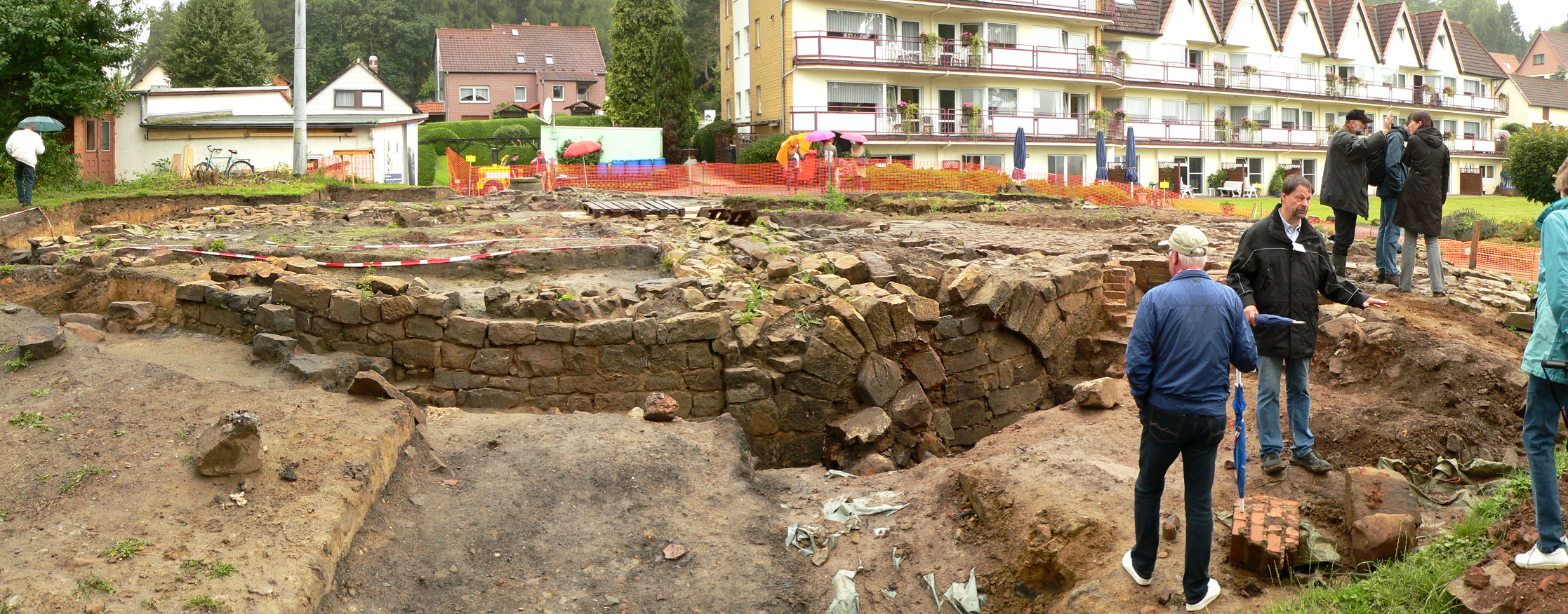 Glashütte Klein Süntel, Führung über die Ausgrabung durch den Grabungsleiter Peter Steppuhn